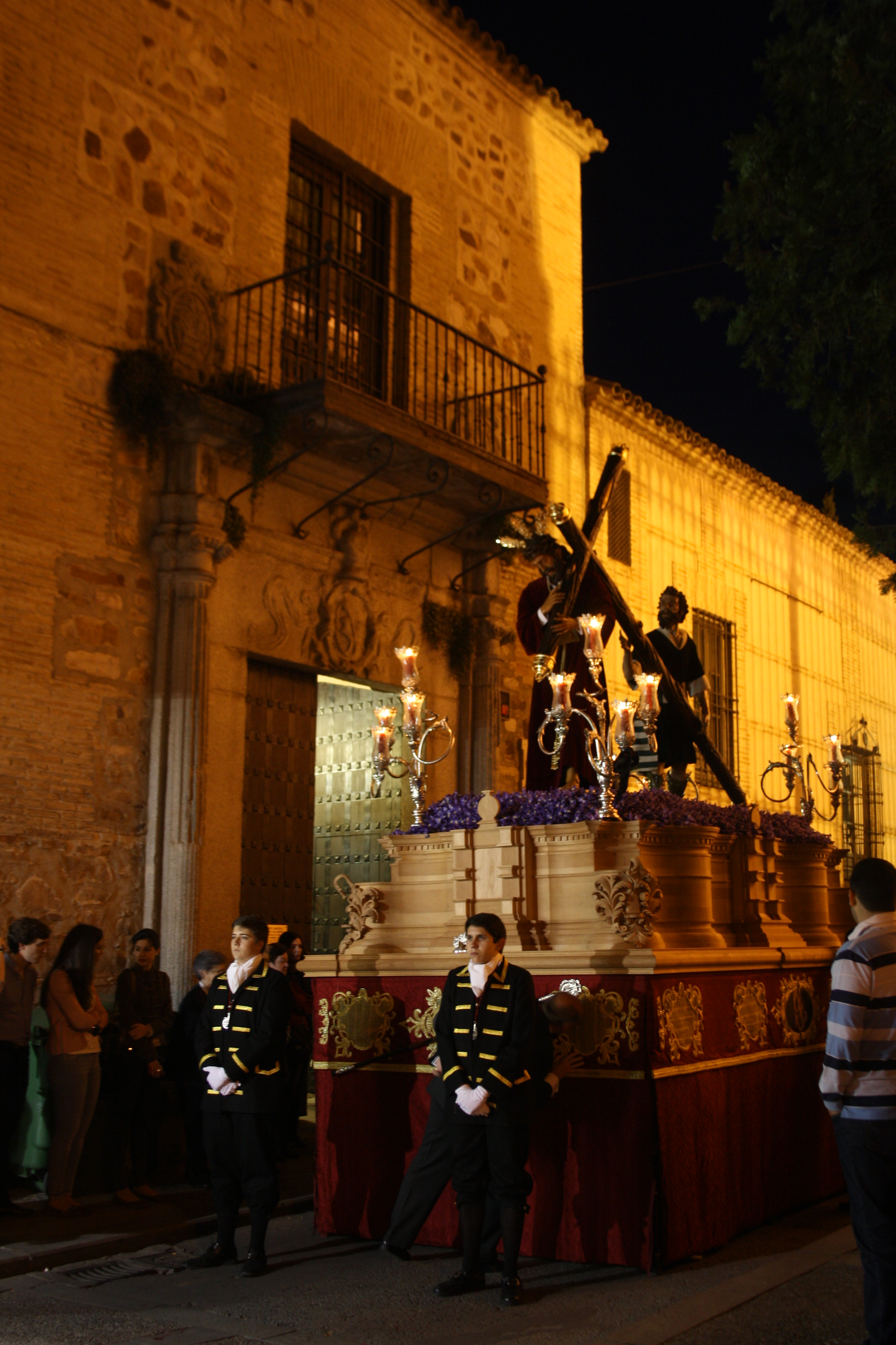 Cofradía de las Penas de Ciudad Real 2014